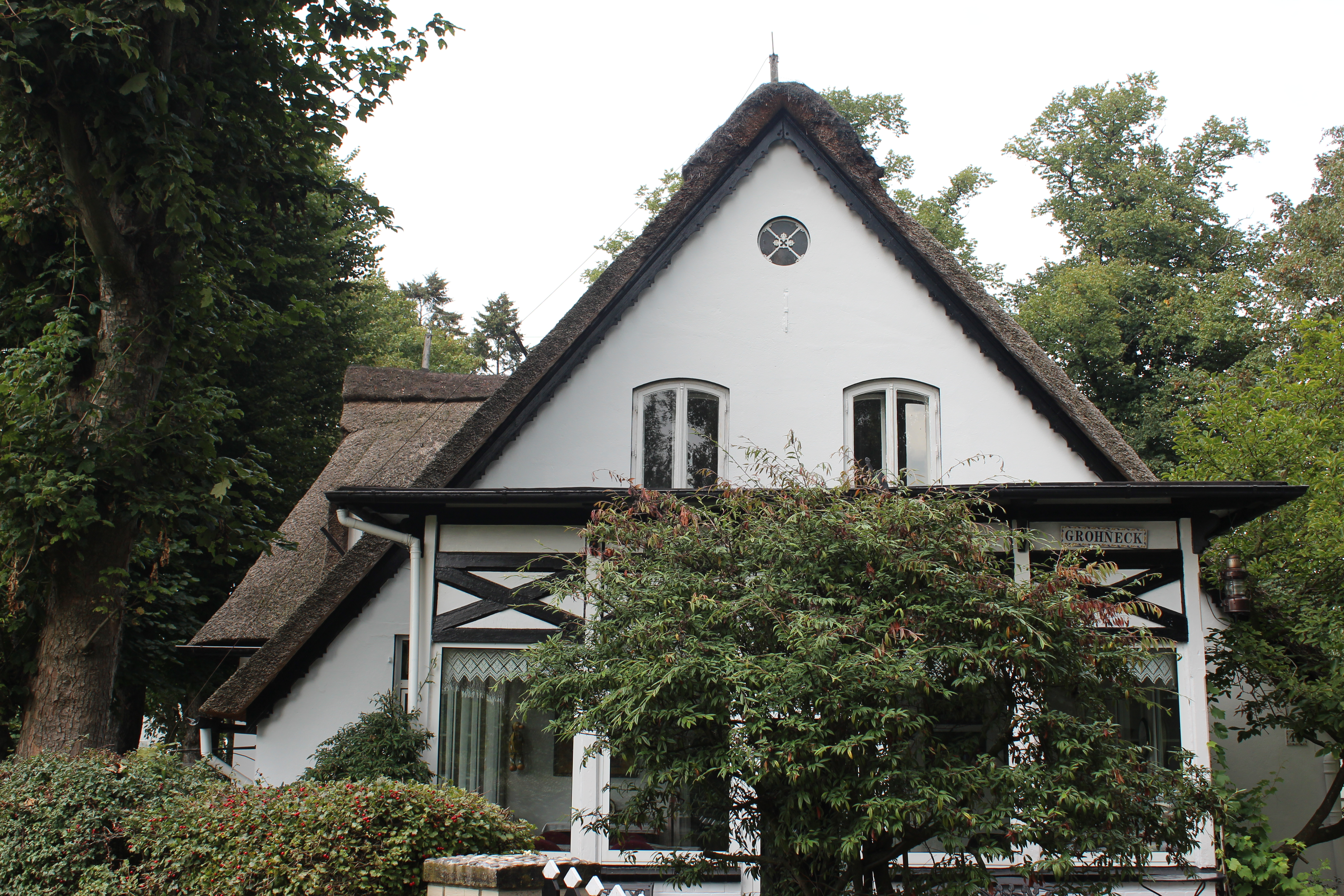 Haus Neu-Grohneck in Bremen, Am Wasser 10.Das abgebildete Objekt ist ein geschütztes Kulturdenkmal in der Freien Hansestadt Bremen, mit der Nr. 1266 beim Landesamt für Denkmalpflege registriert.